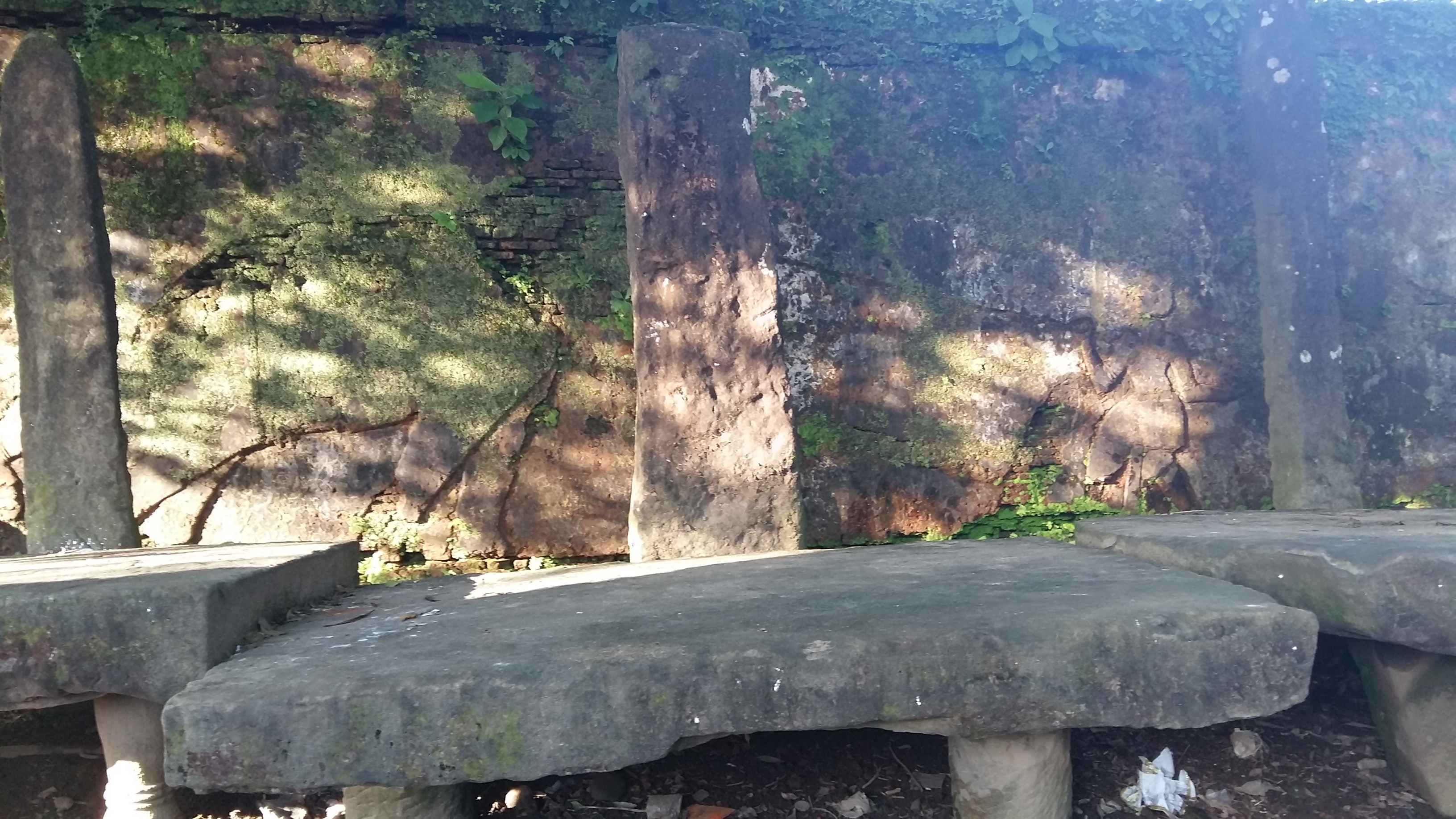 মেগালিথ সমাধি সৌধ, জৈন্তাপুর